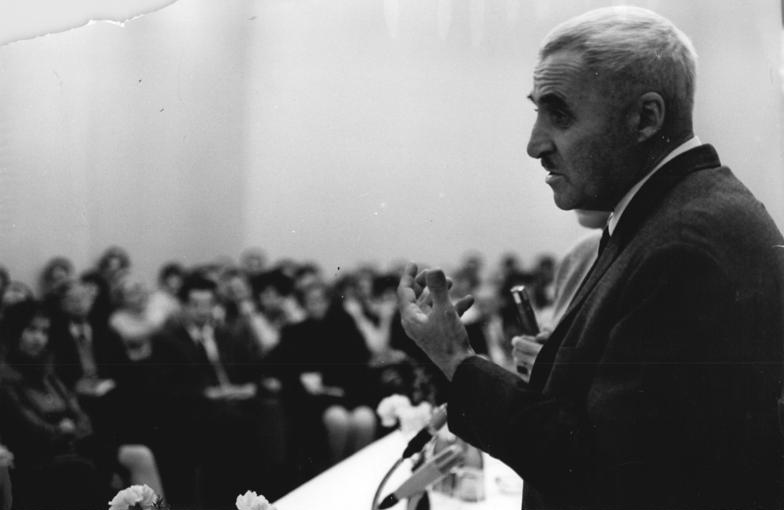 Zentralbild Brüggmann 18.10.1967 Berlin: Schriftsteller Konstantin Simonow im Klub der Kulturschaffenden Im überfüllten Saal des Klubs der Kulturschaffenden sprach auf einem Literaturabend am 18.10.1967 der u.a. durch sein Werk "Die Lebenden und die Toten" weltbekannte sowjetische Schriftsteller Konstantin Simonow über seine Werke.